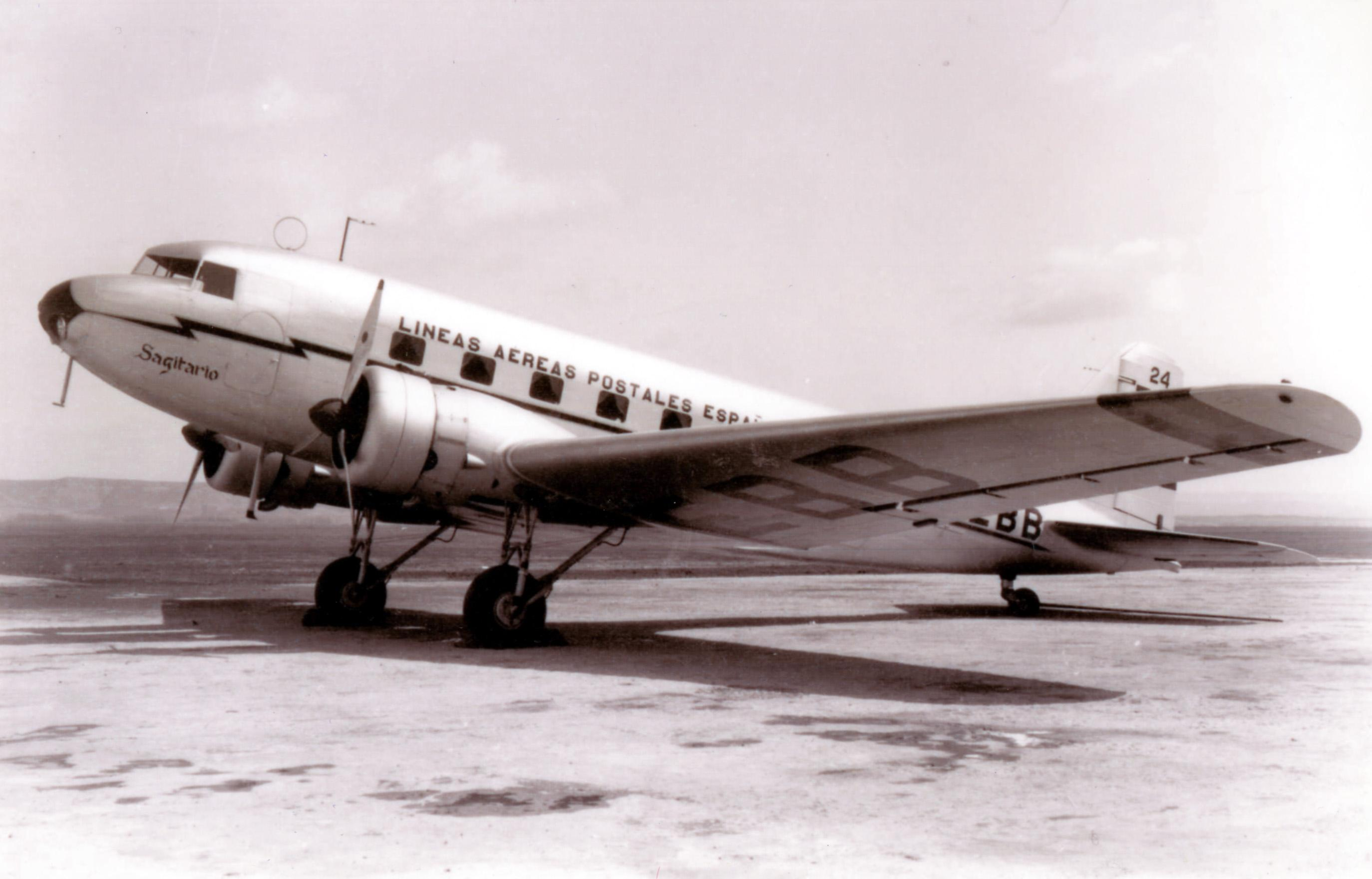 DC- 2 (LAPE)